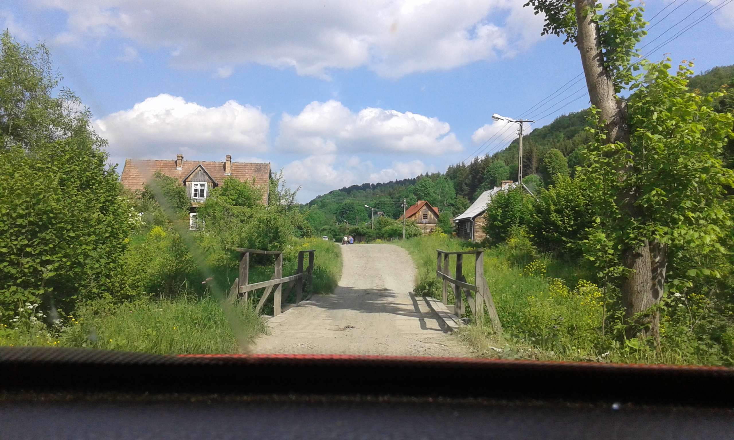 Mików. Mostek nad potokiem Mikowy